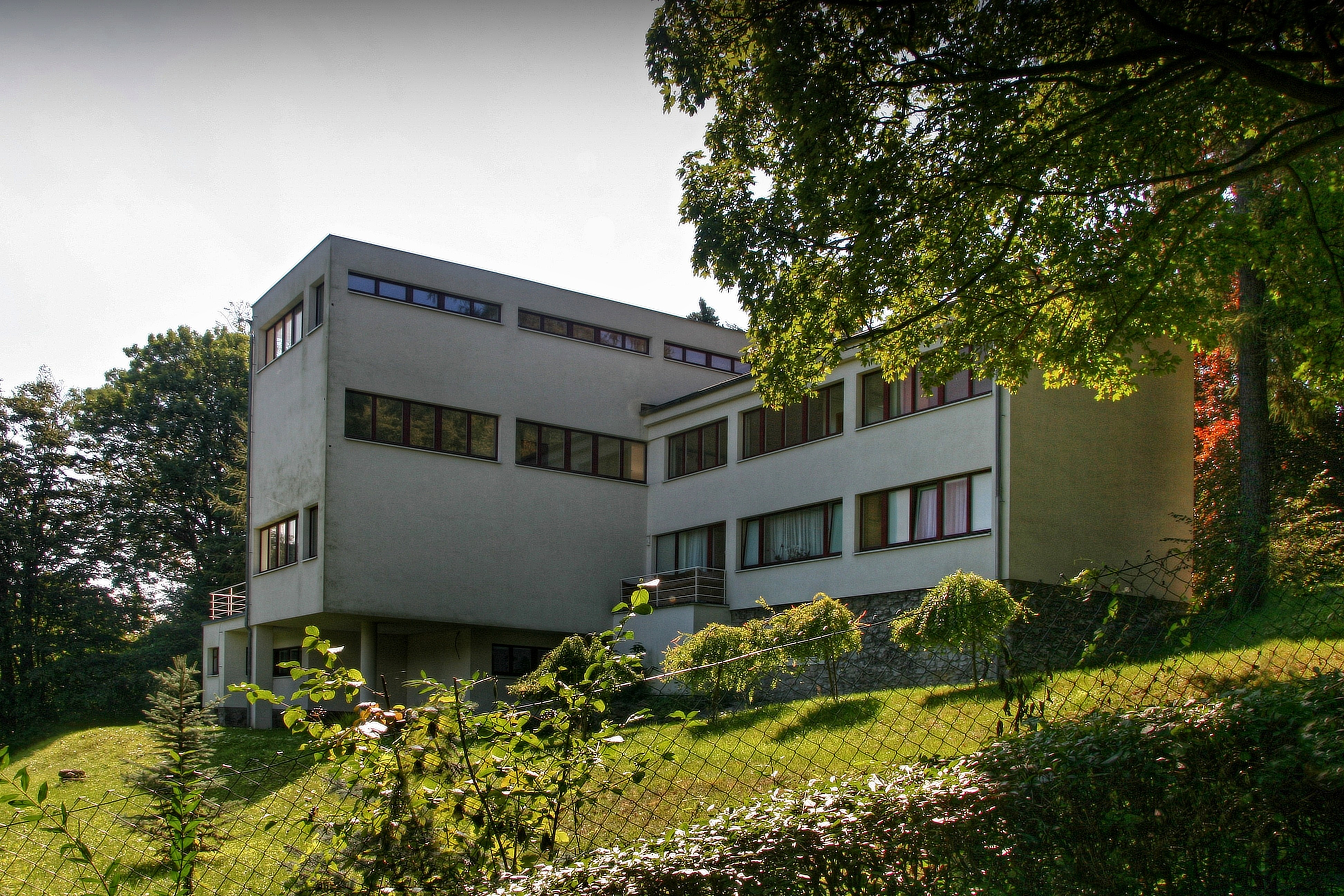 Vila (Teplice nad Bečvou), nad lázeňským domem Bečva 59, Teplice nad Bečvou, Teplice nad Bečvou.